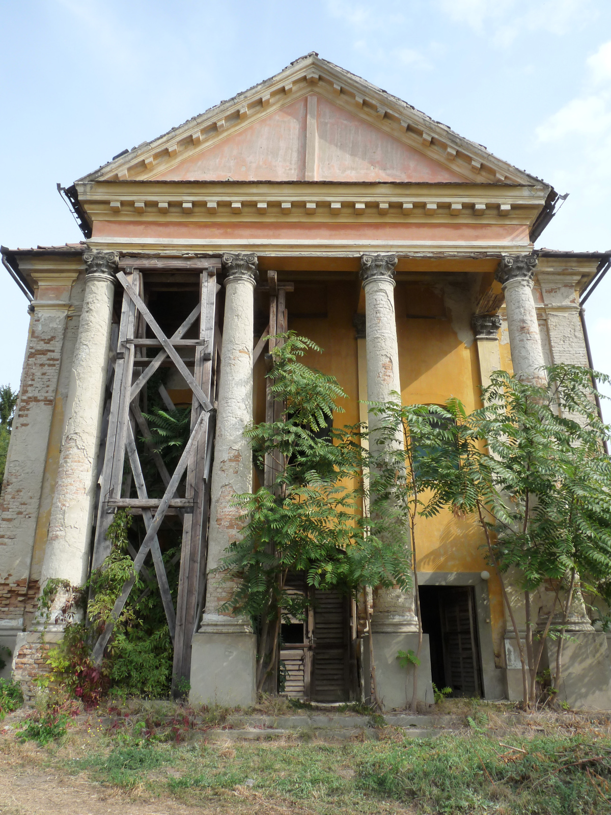 Zsinagóga (Abony, Deák Ferenc utca 4.)